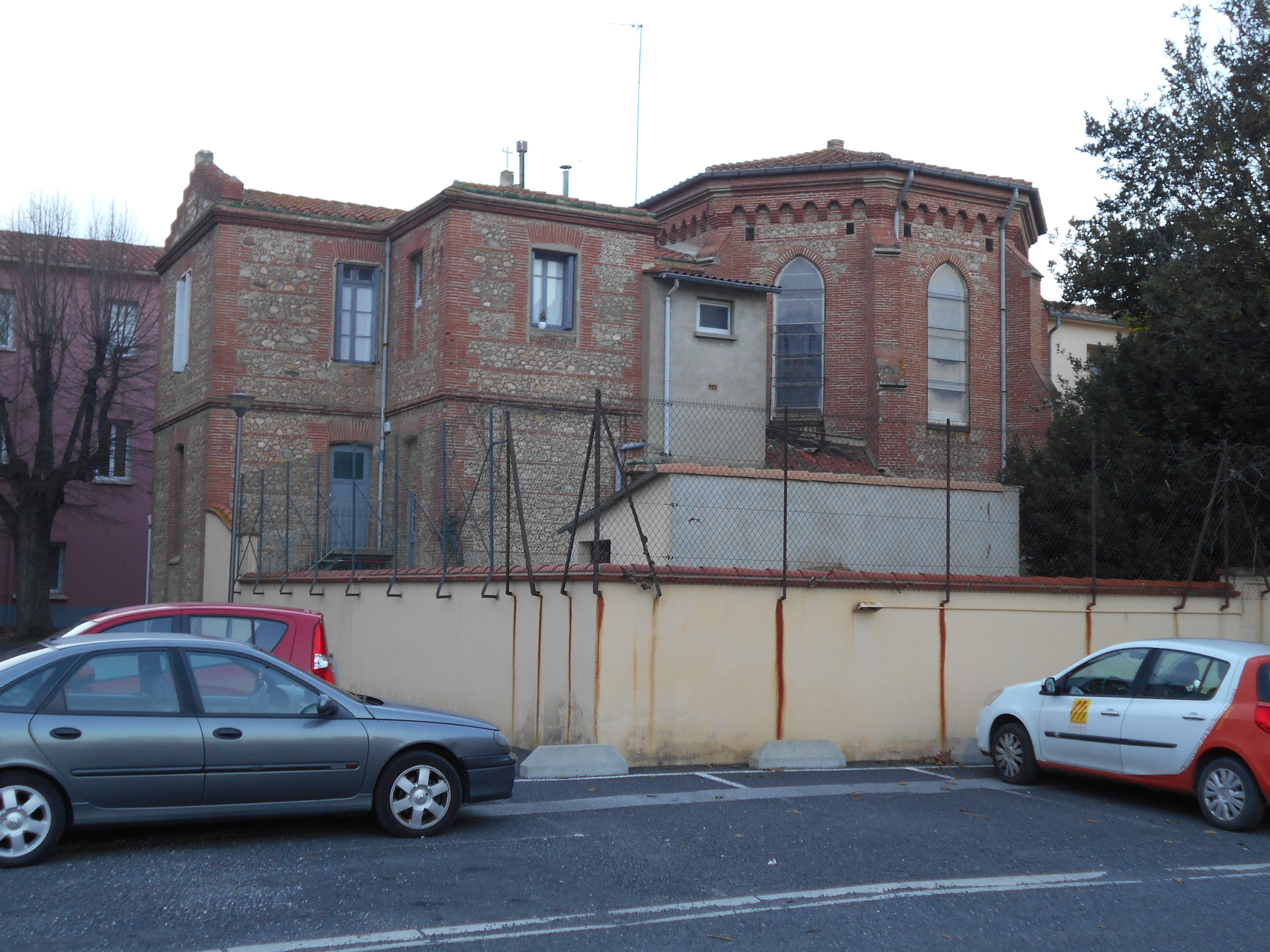 Capçalera, a llevant, del Bon Pastor.